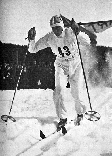 Martin Matsbo. Skidåkare